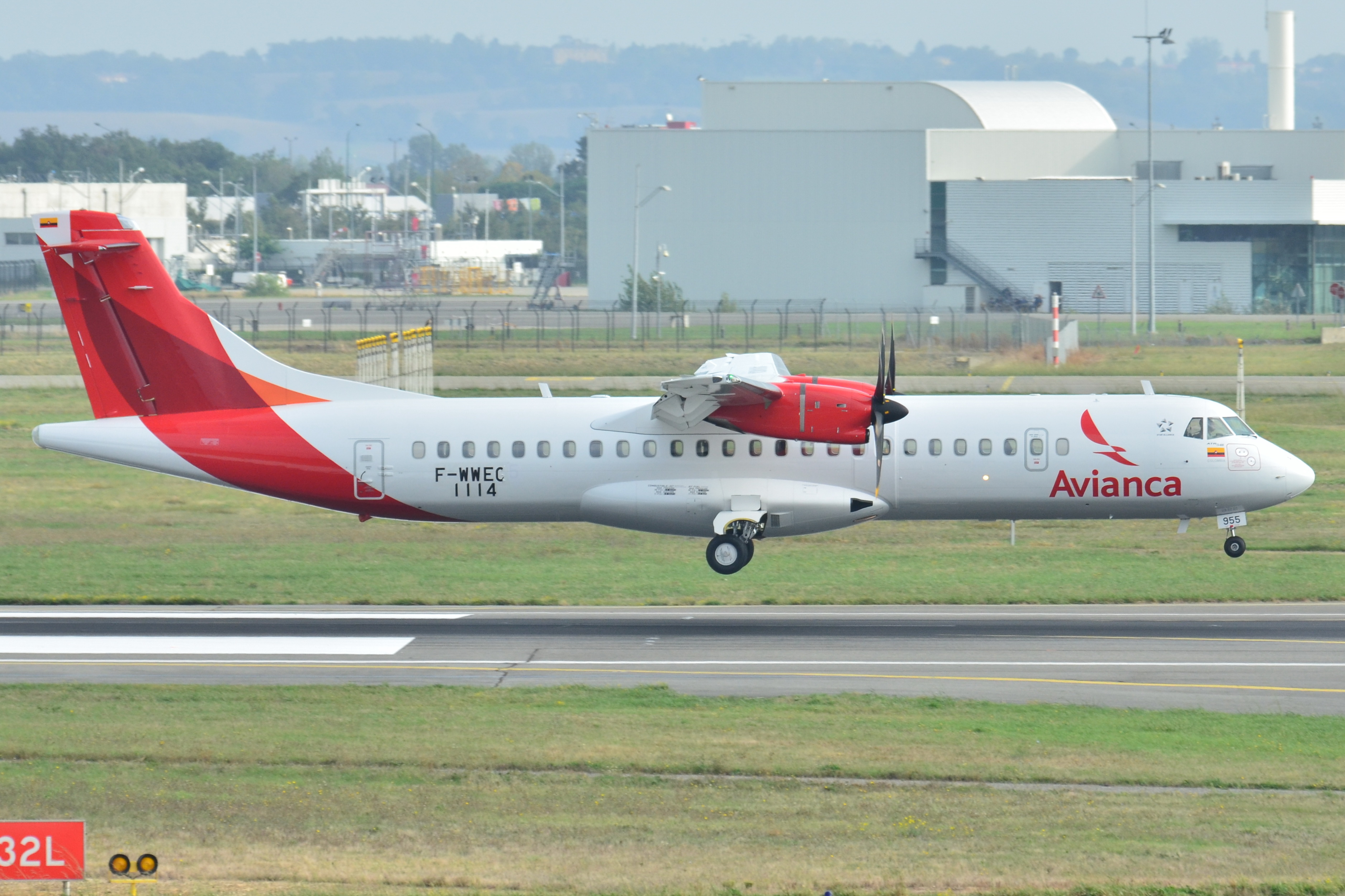 Photo prise à l'aéroport de Toulouse-Blagnac (LFBO) en France. Picture take at Toulouse-Blagnac Airport (LFBO) in France.